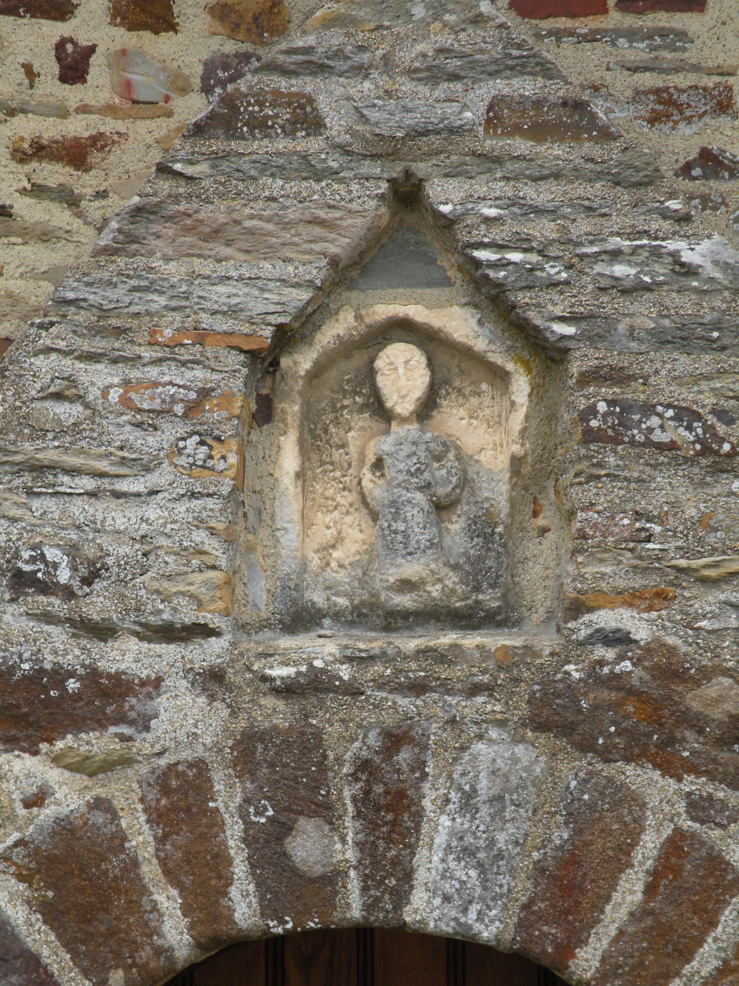 Statue située au-dessus de la porte de la chapelle Sainte-Agathe de Langon.